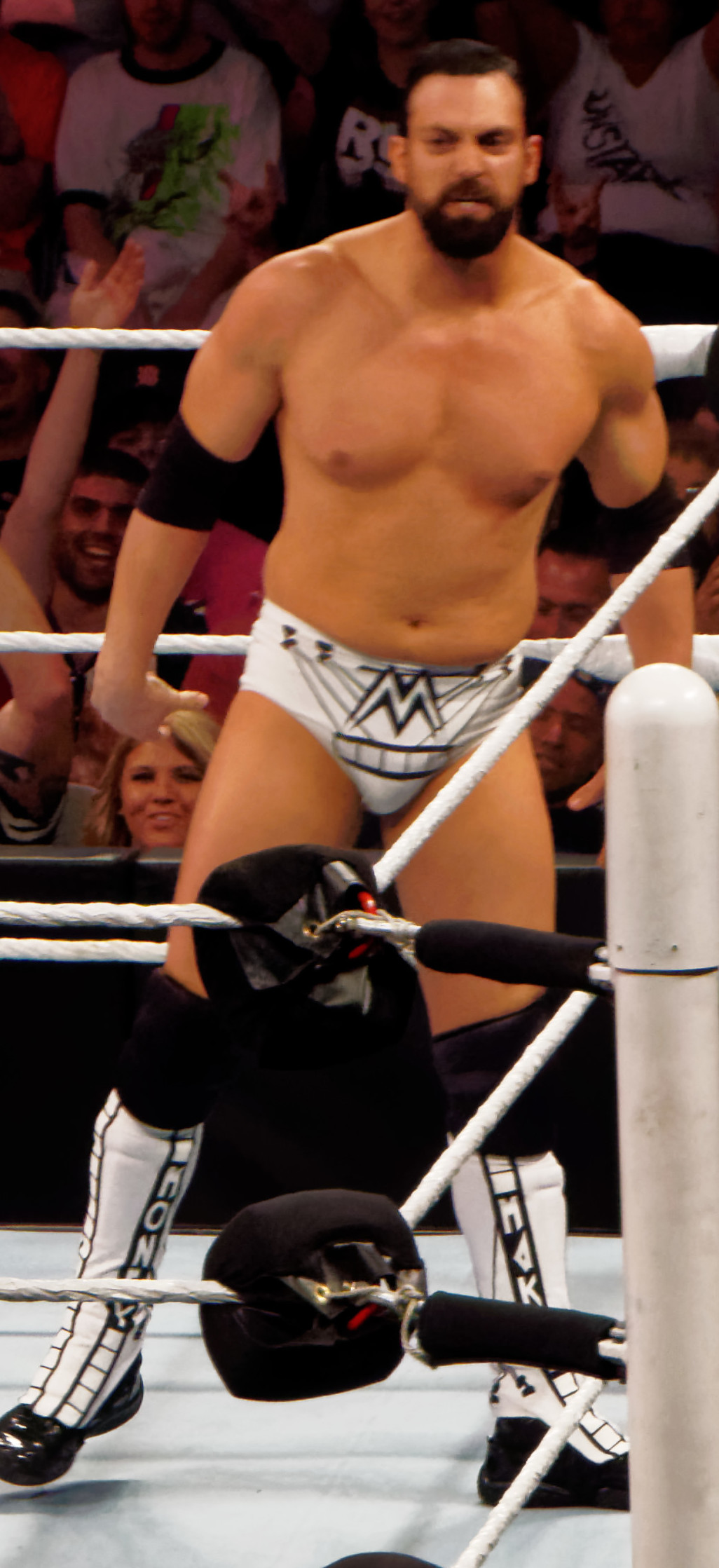 2015-03-30_18-23-26_ILCE-6000_1877_DxO